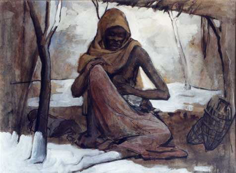 Carlo Ludovico Bompiani - La Capanna In qualità di erede del diritto d'autore dell'opera e di autore della fotografia, autorizzo la diffusione di questa immagine purché sia contestualmente citato il nome del pittore. Spino 20:42, Nov 16, 2004 (UTC) Categoria:Immagini d'arte italiana